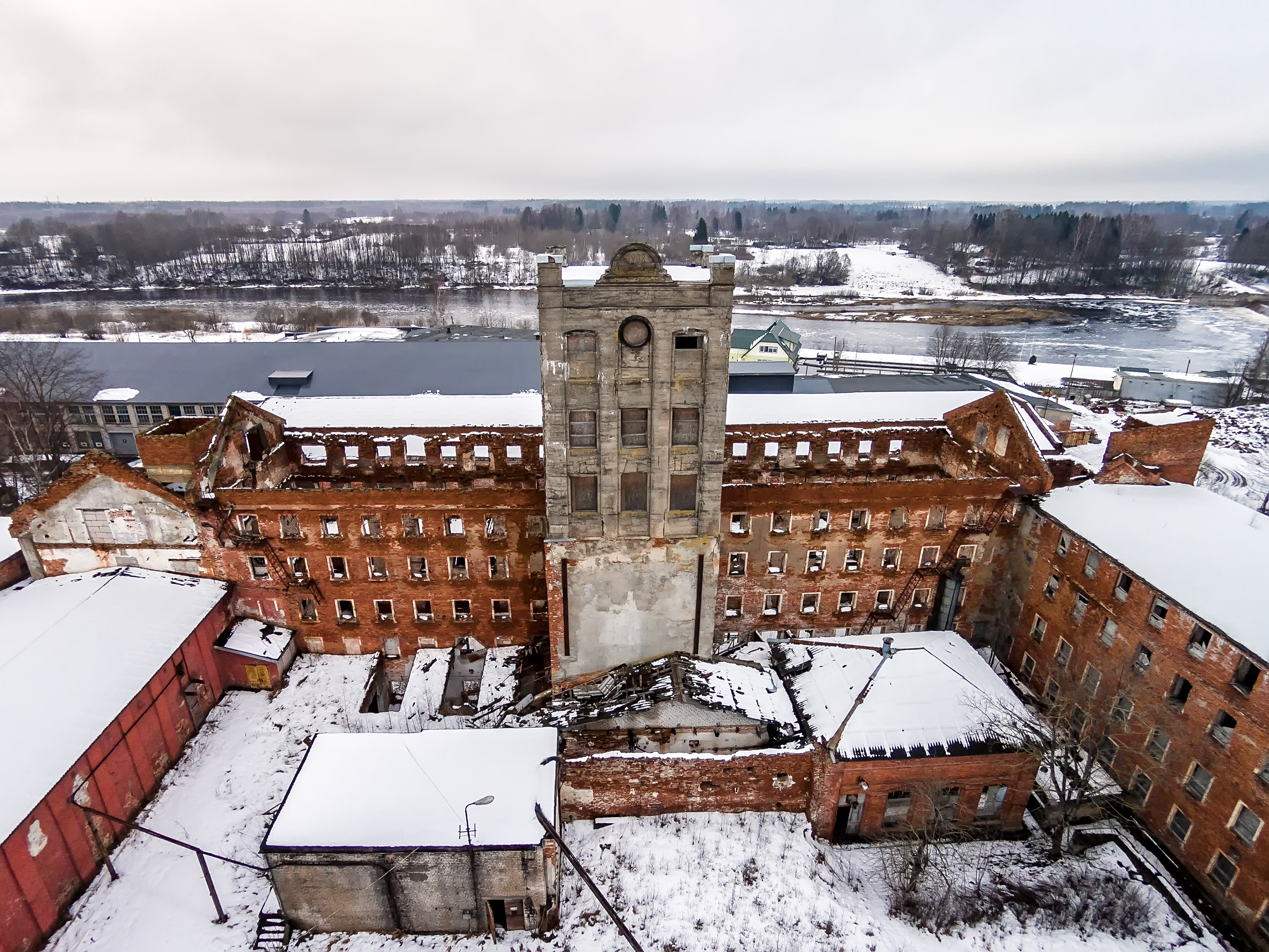 Sindi Kalevivabrik